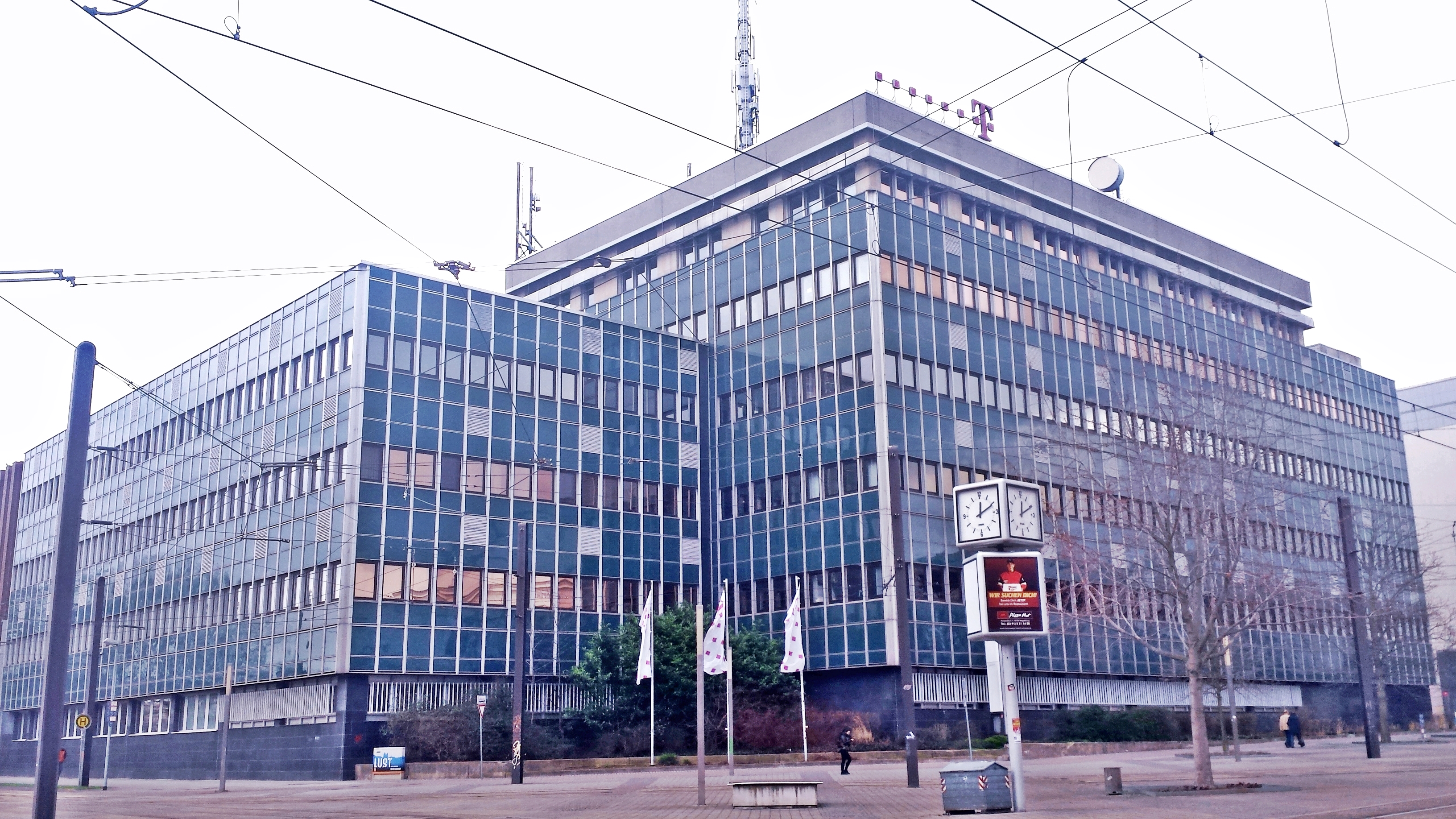 Niederlassung der Telekom AG in Magdeburg